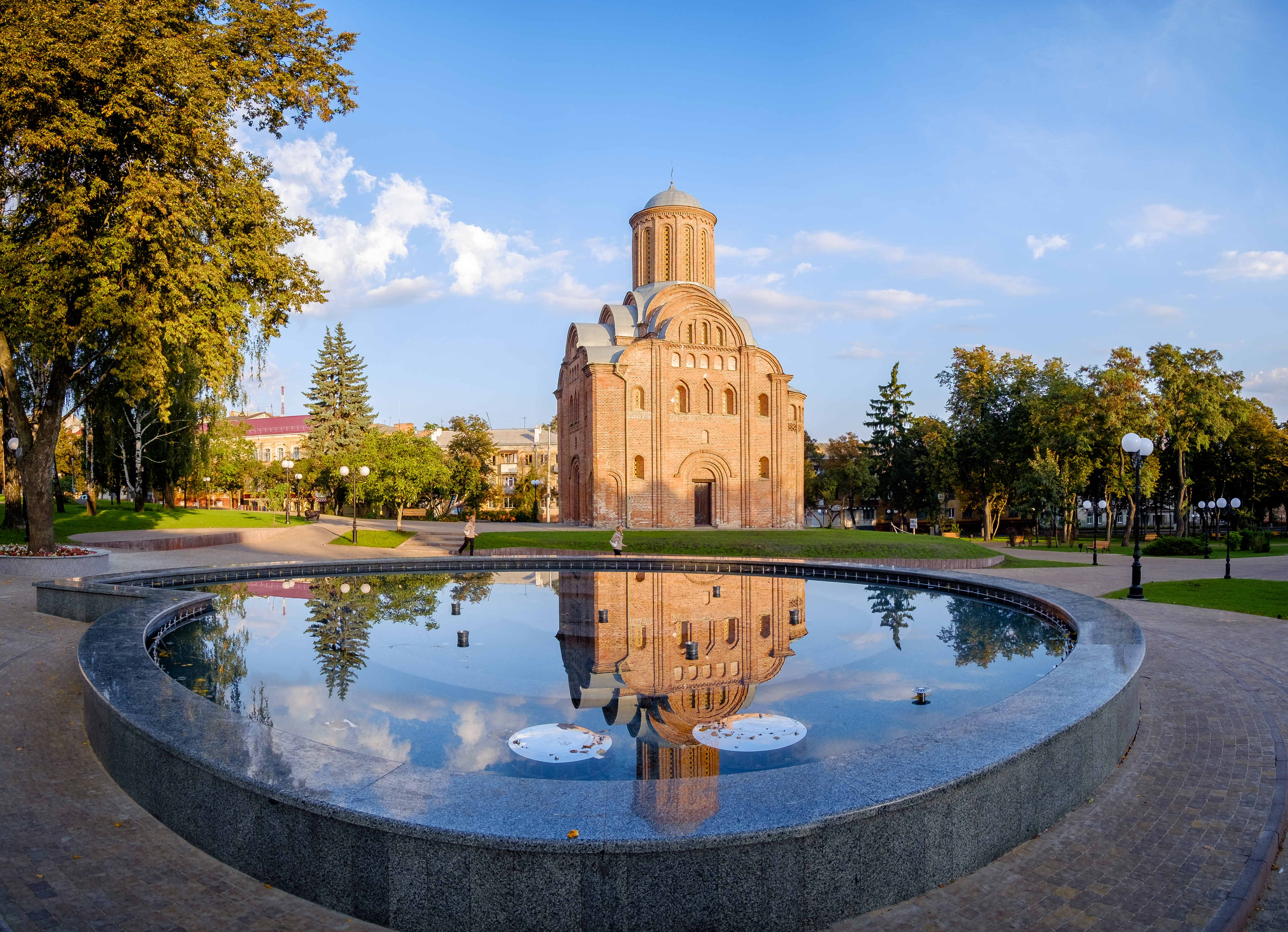 П'ятницька церква (мур.), Чернігів, вул.гетьмана Полуботка, 3